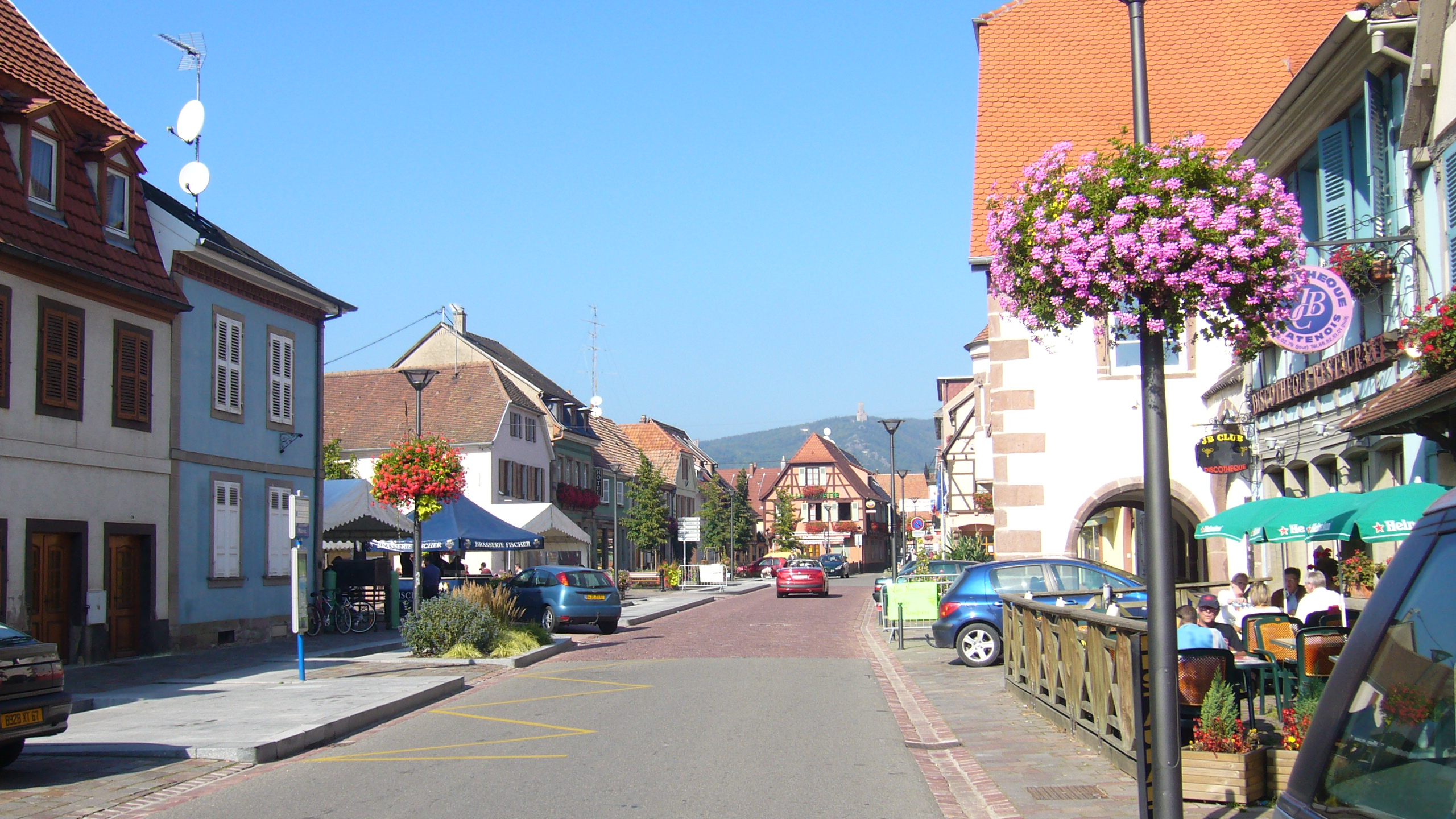 La rue principale de Châtenois